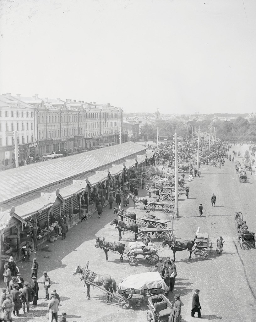 Малая Сухаревская площадь. Вид с Сухаревой башни.